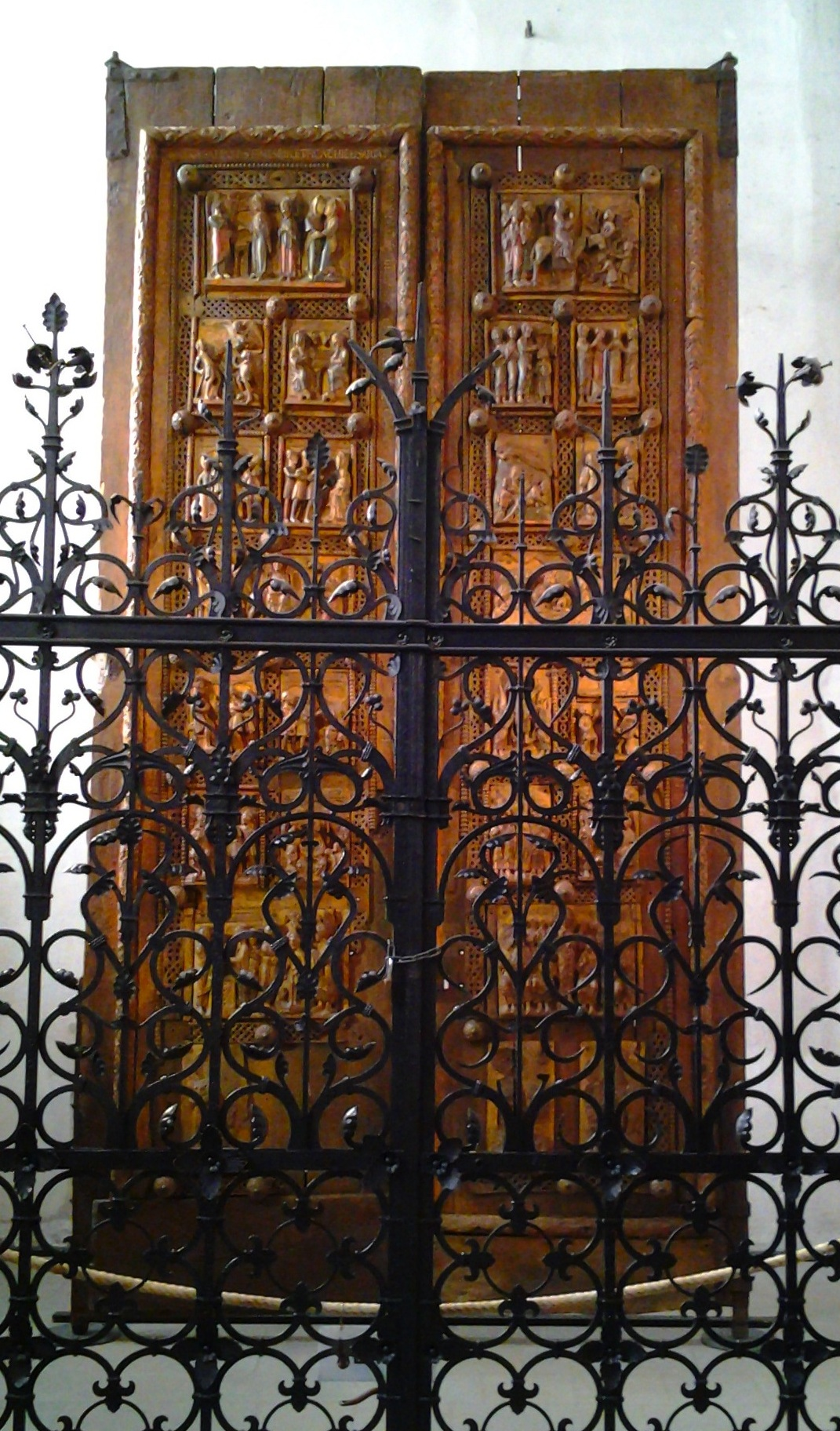 Kapitolstüren Vollansicht